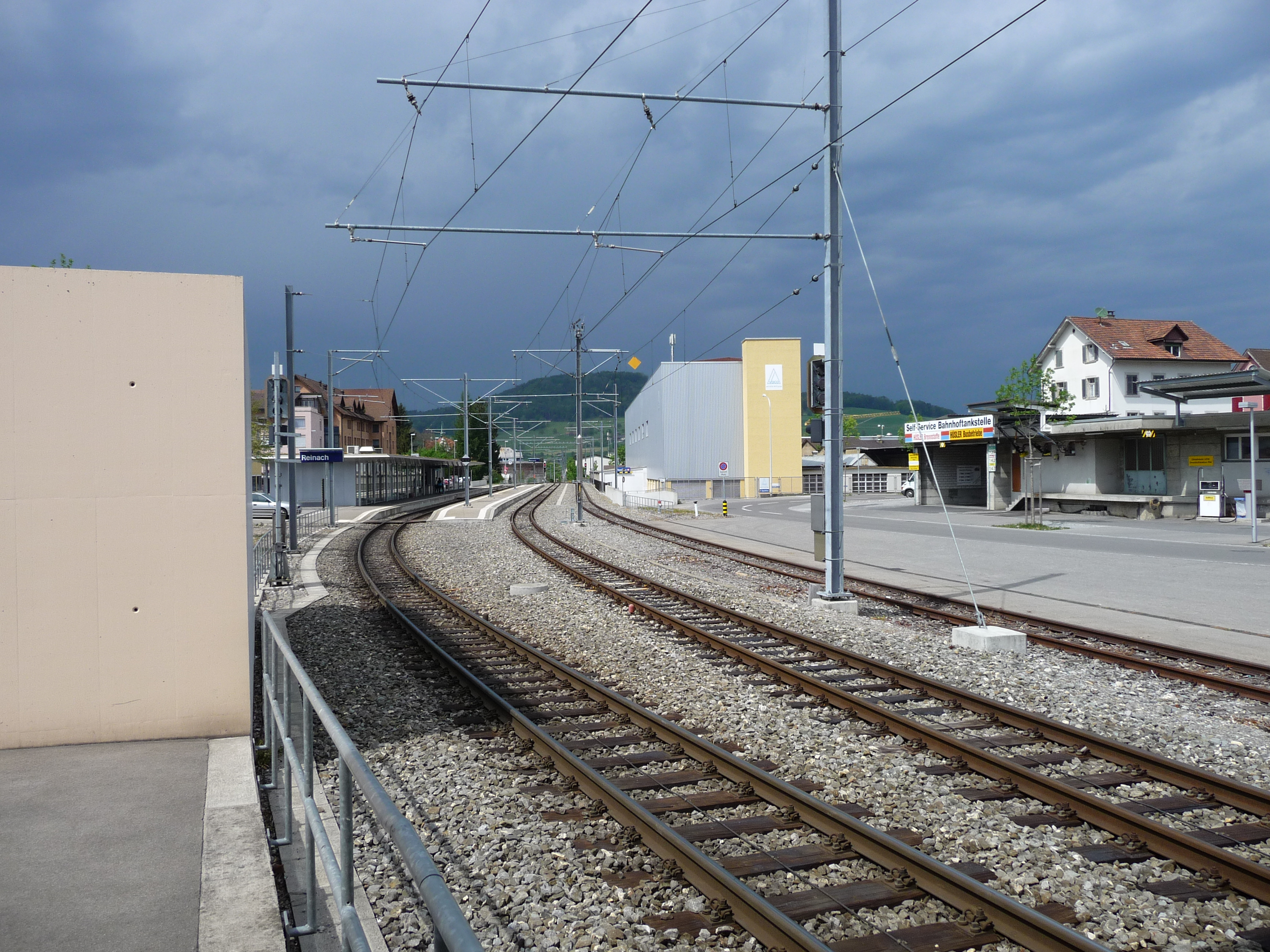 Bahnhof in Reinach